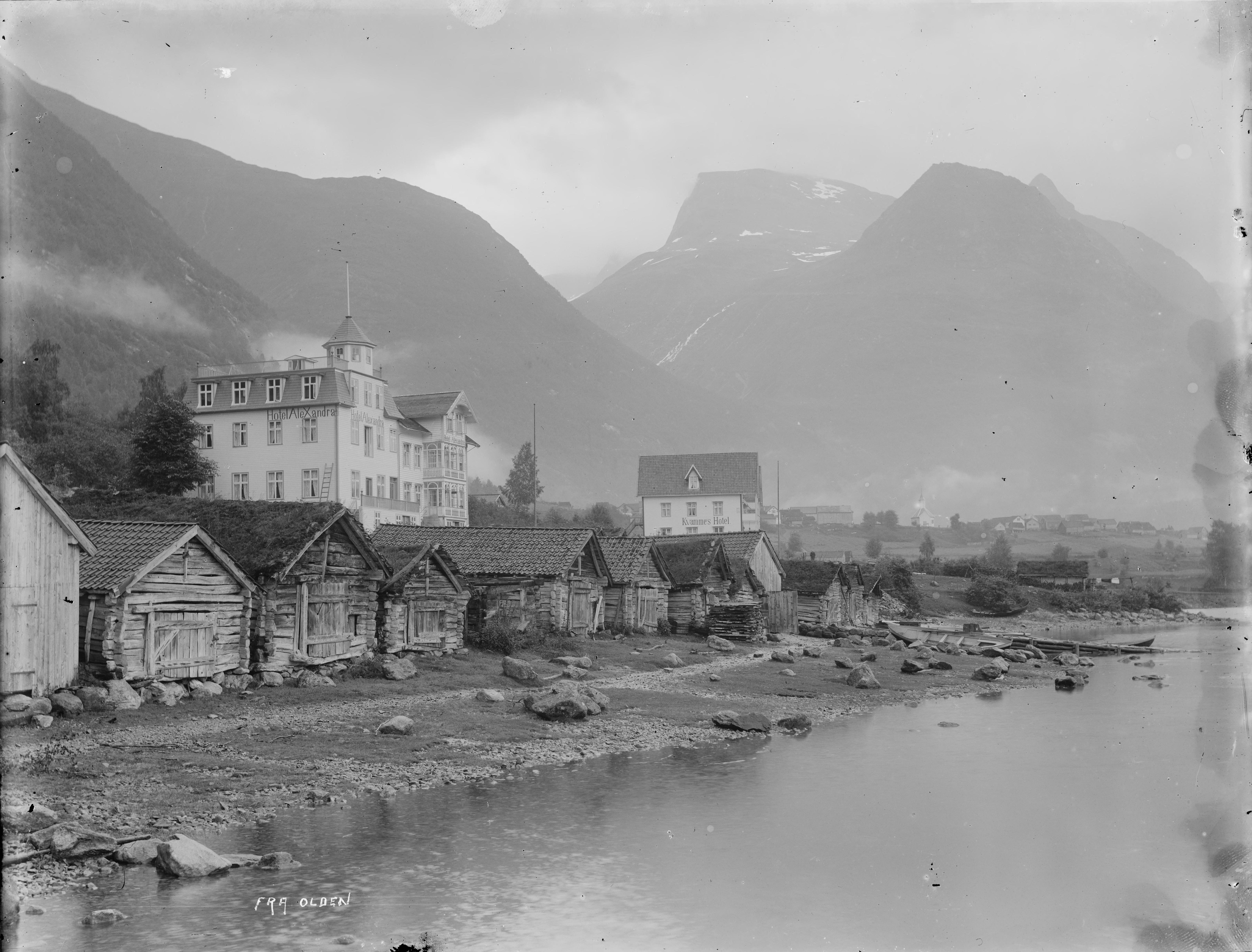 Påskrift negativ: Fra Olden Påskrift negativ: 308 Olden Fot. Skøien [Riksantikvaren] Påskrift konvolutt: B-308 Olden Hotel Alexandra 2, Kvammes hotel[Riksantikvaren] Sted: Olden,Stryn Kommune: Stryn Fylke: Sogn og Fjordane Tagger: landskap bygd sjøbuer bebyggelse hotell Hotel Alexandra Kvamme´s Hotel